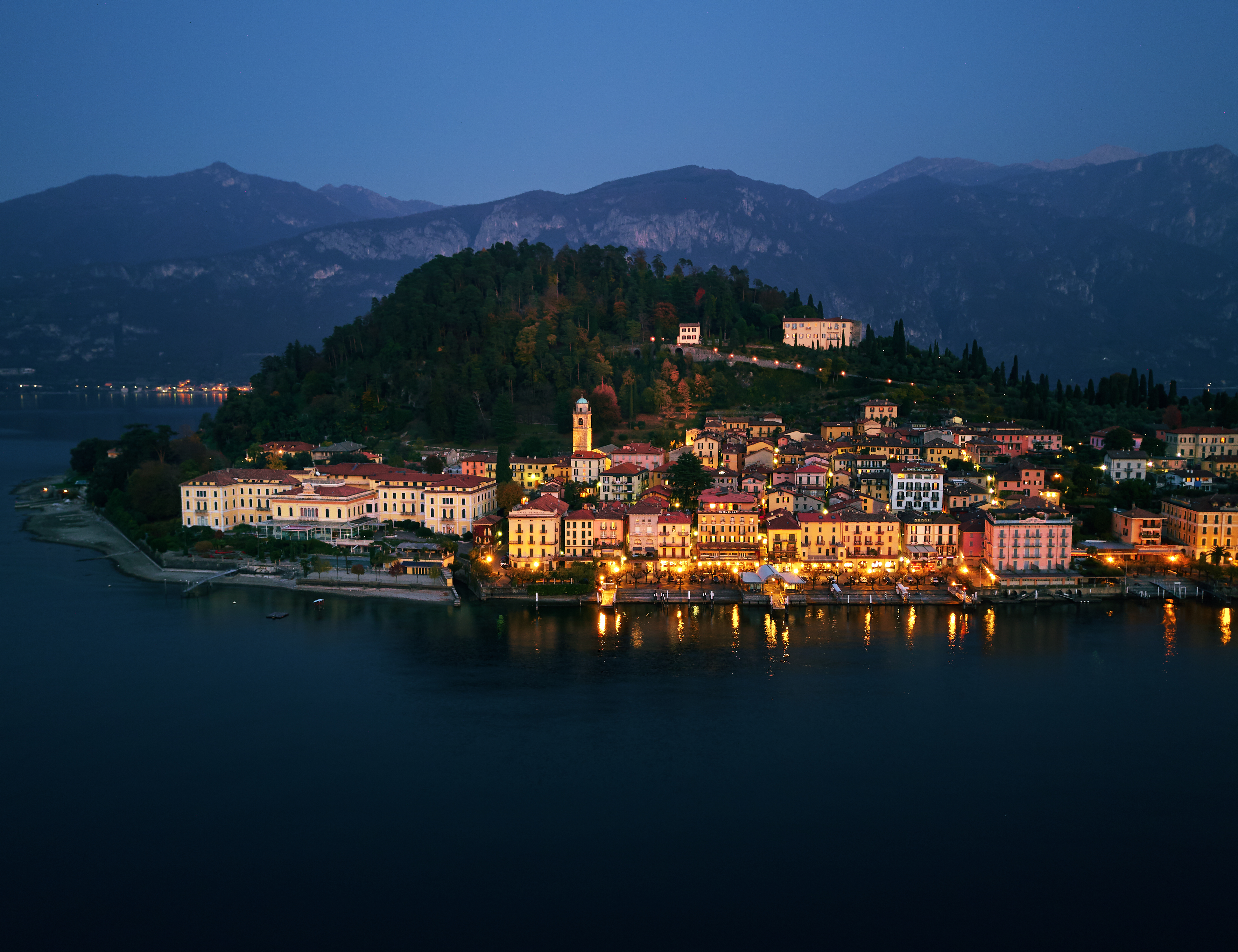 Bellagio